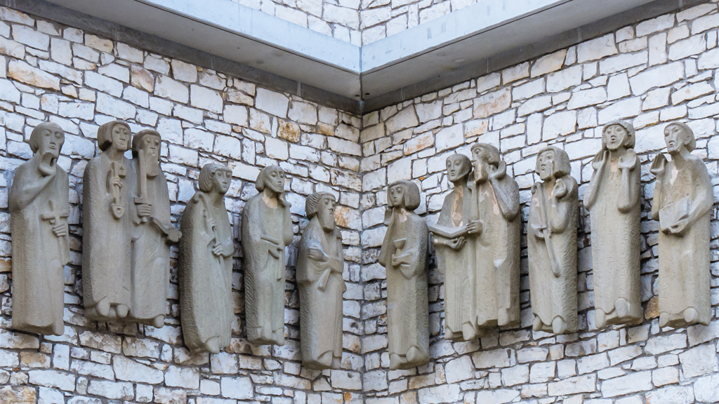 Steinrelief der Apostel von Steinacker an der Außenwand der Apostelkirche